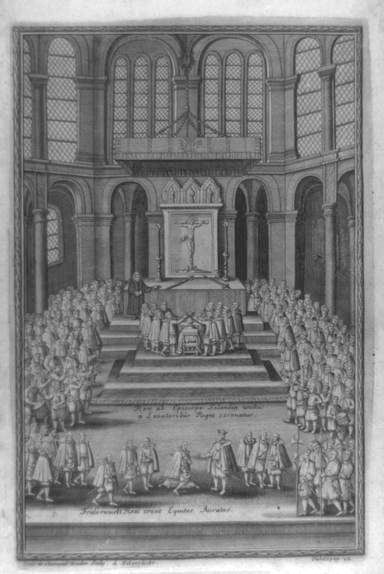 Frederik IIs kroning i Vor Frue kirke i 1559. Stikk etter Caspar Ens.